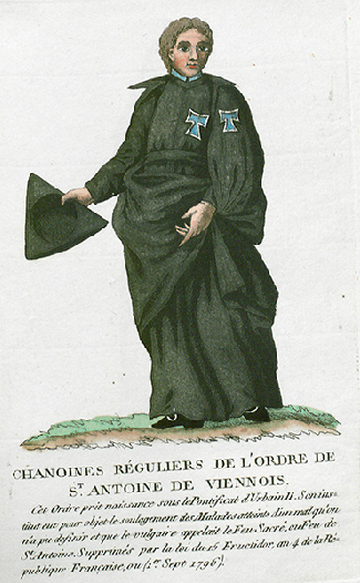 Collection de costumes de tous les ordres monastiques, supprimés à differentes époques, dans la ci-devant Belgique, Bruxelles, Philippe Joseph Maillart et sœur, 1811